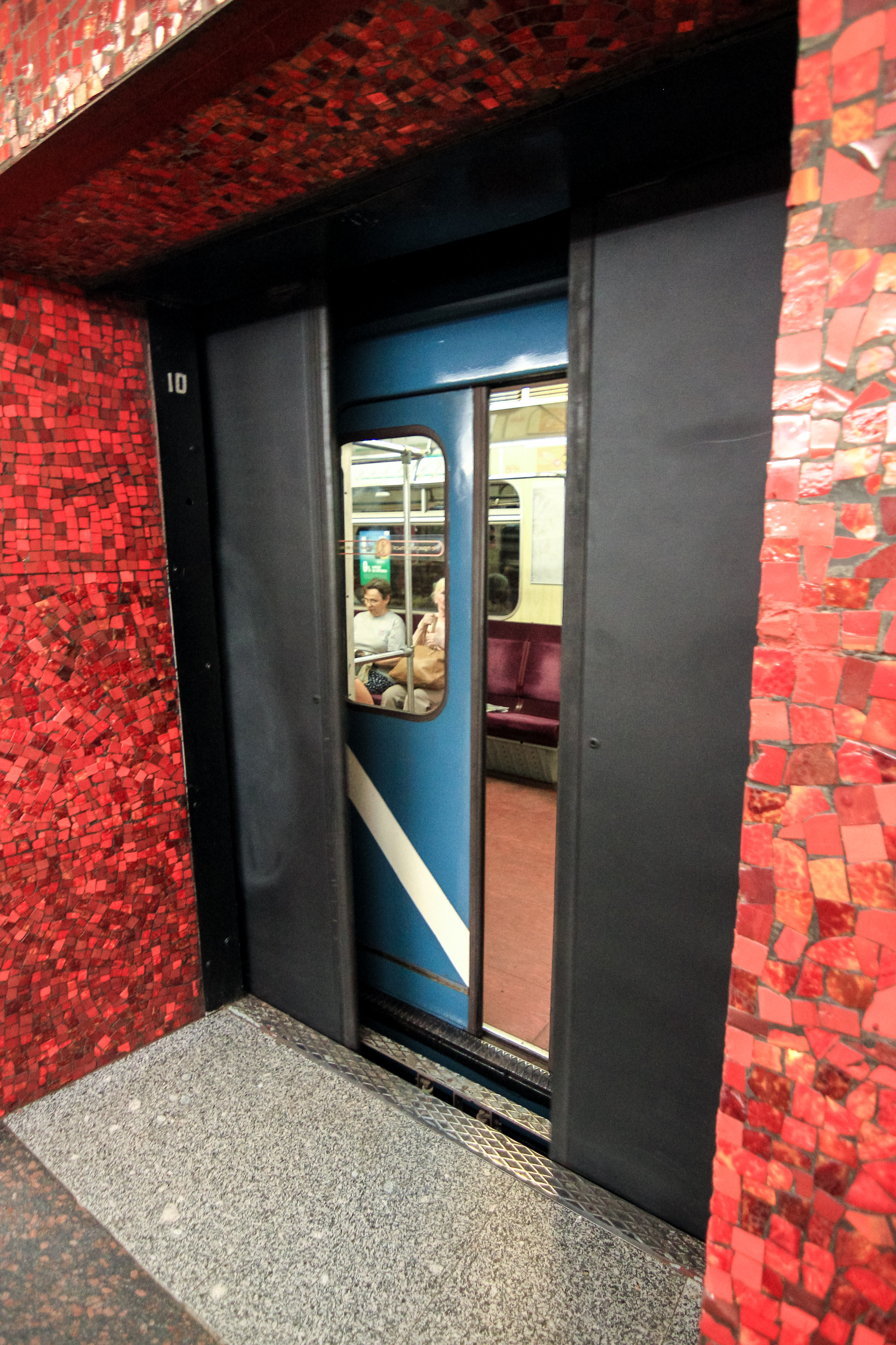 Маяковская (станция метро, Санкт-Петербург)